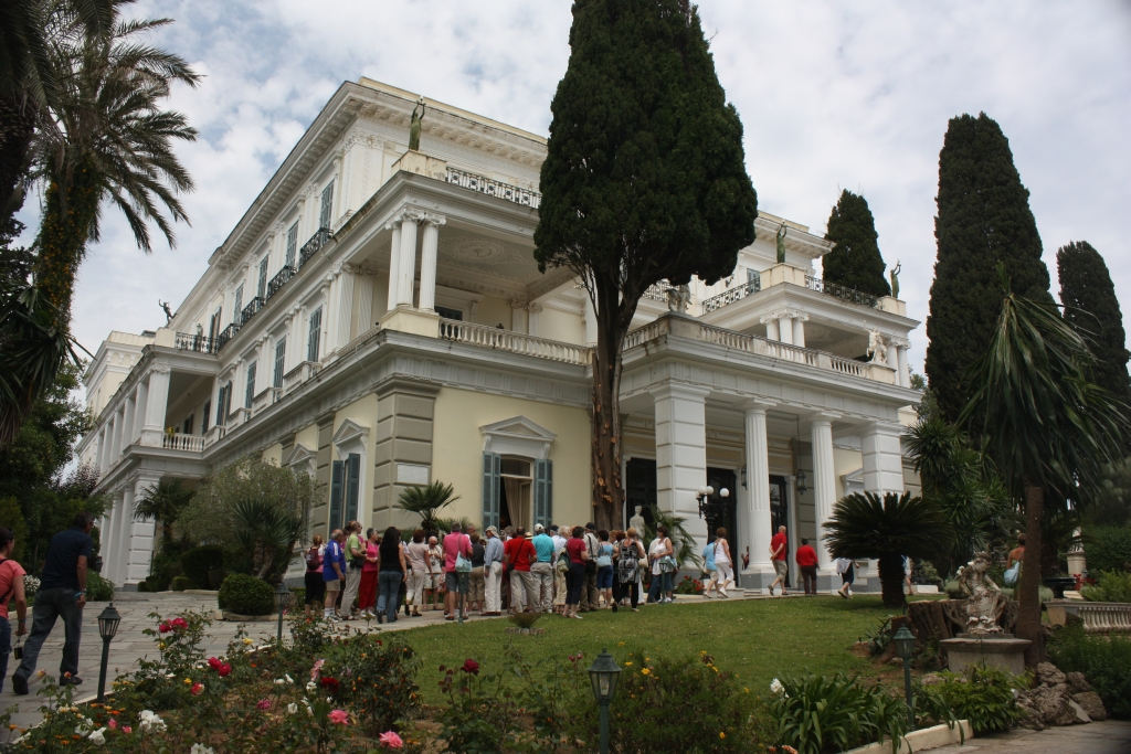 Achilleon Eingang